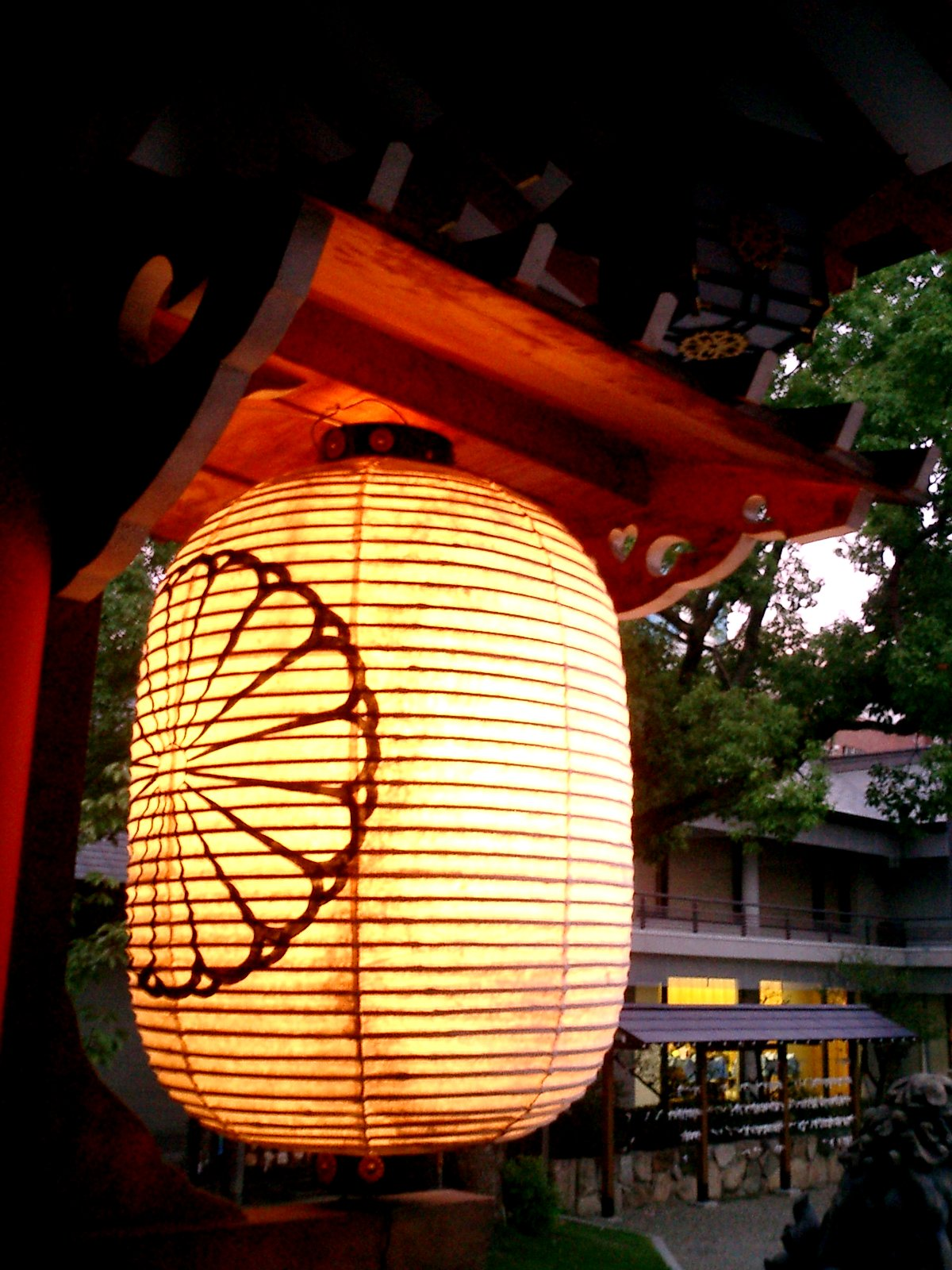 Chochin